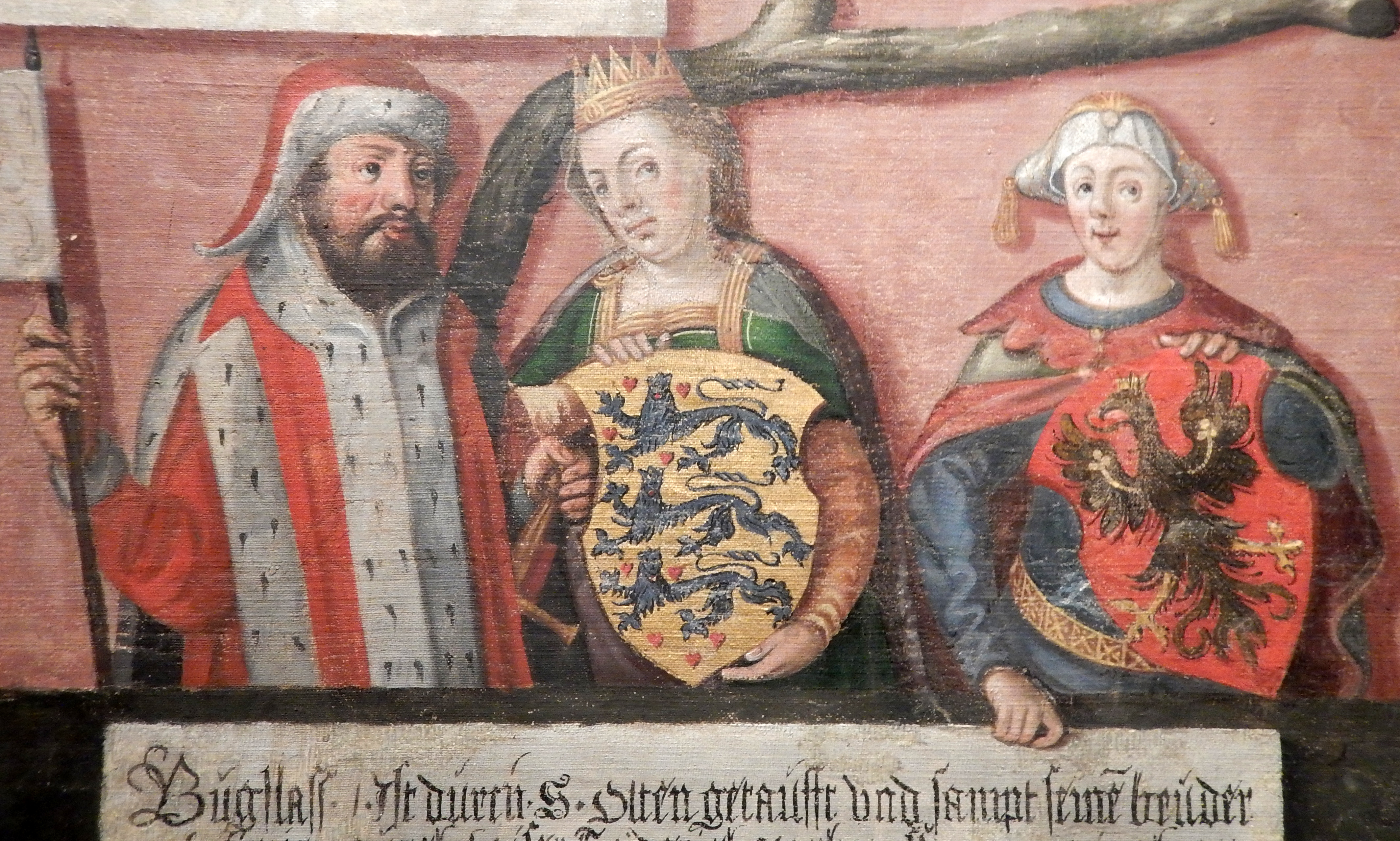 Bogislaw I. von Pommern mit seinen beiden Gemahlinnen Walburgis und Anastasia von Polen.